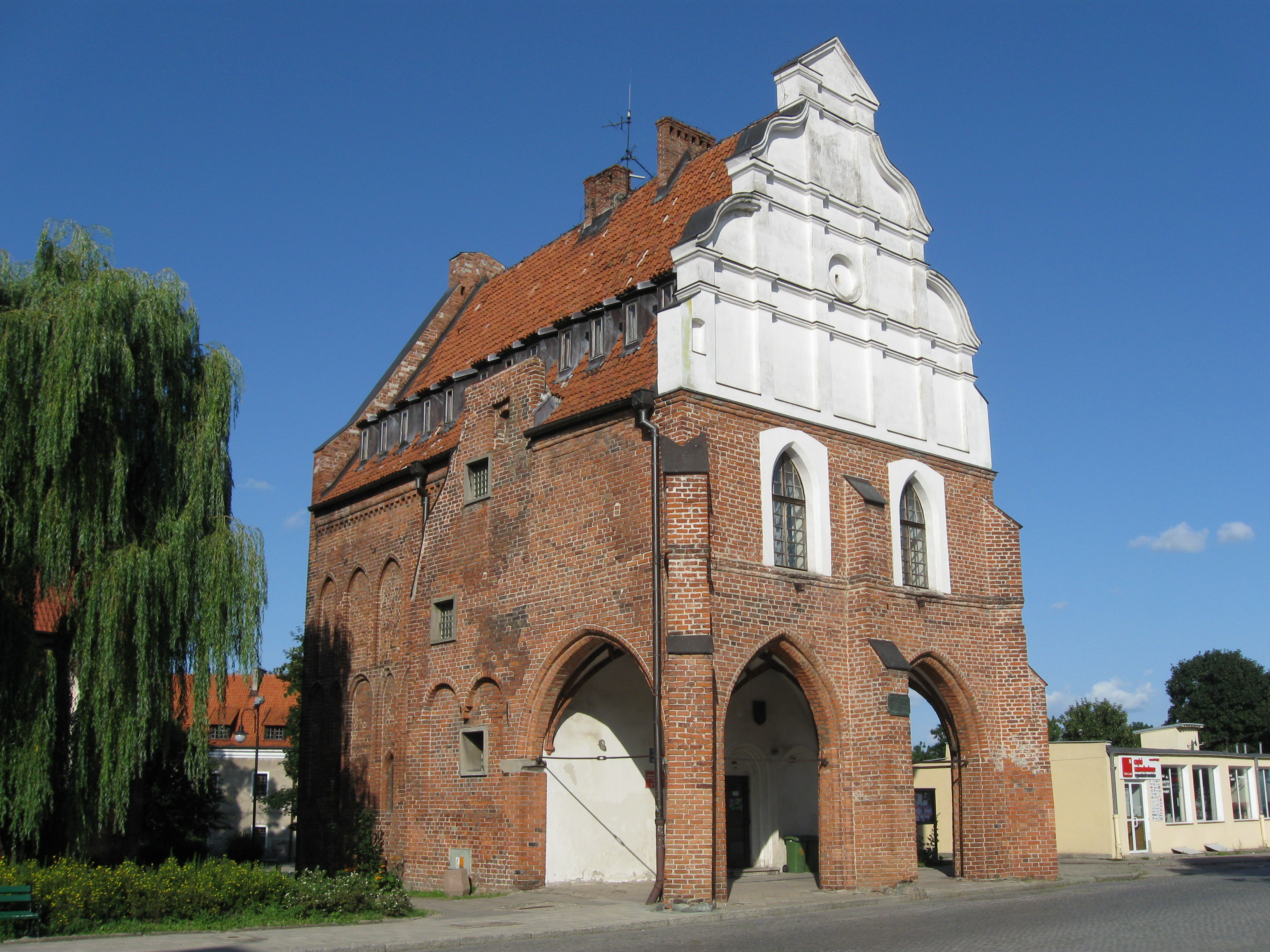 Pasłęk, ul. Chrobrego - ratusz (mury ratusza)